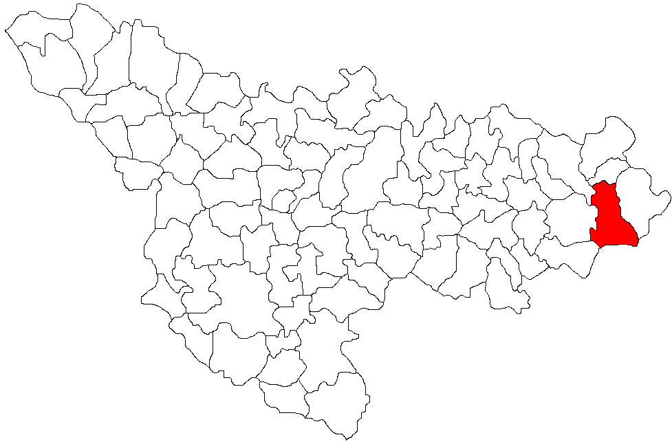 Categorie:Hărţi ale judeţului Timiş